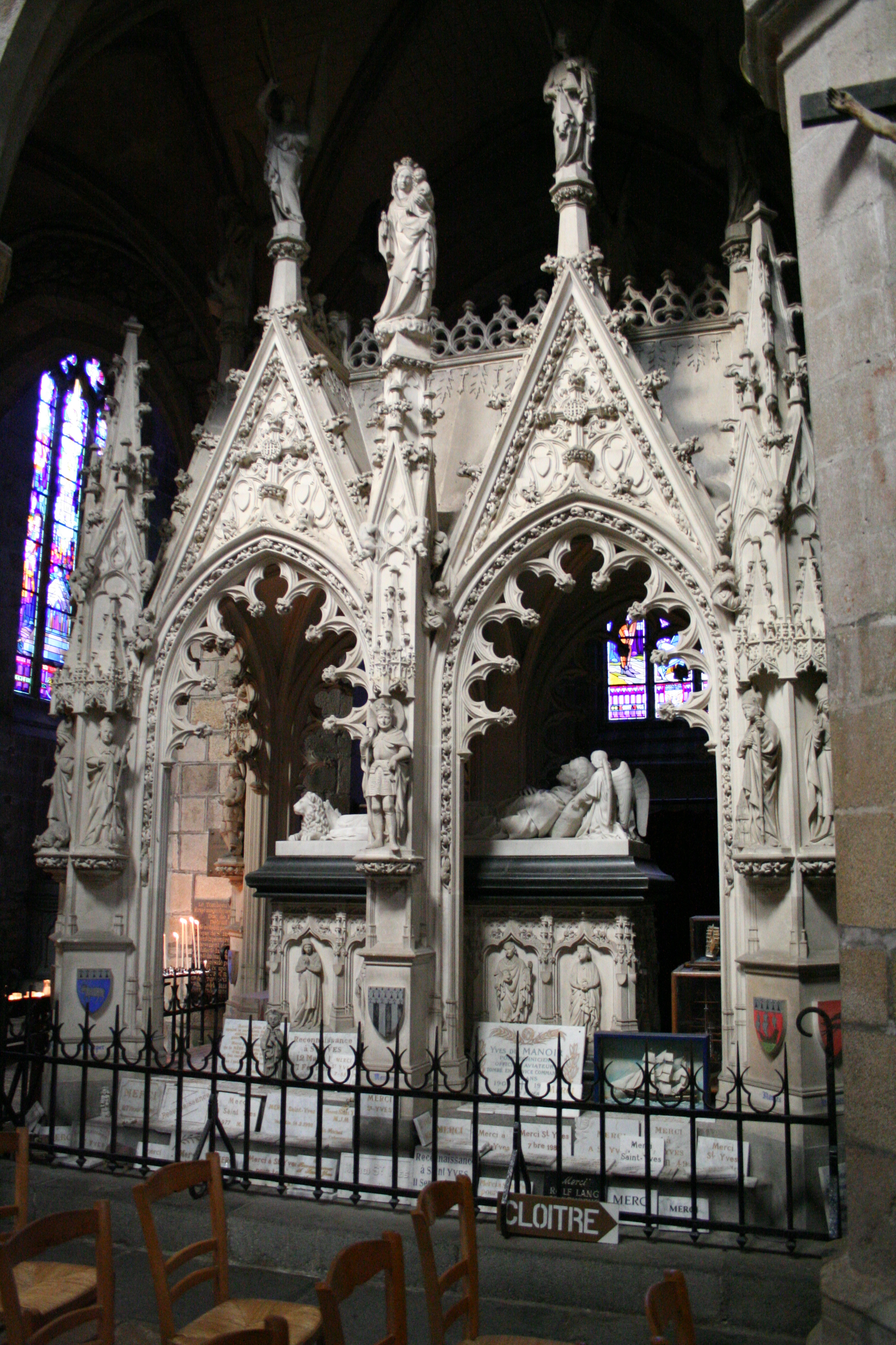 Cathédrale Saint-Tugdual de Tréguier - Tréguier - Côtes d'Armor - France: sépulcre de Saint Yves .